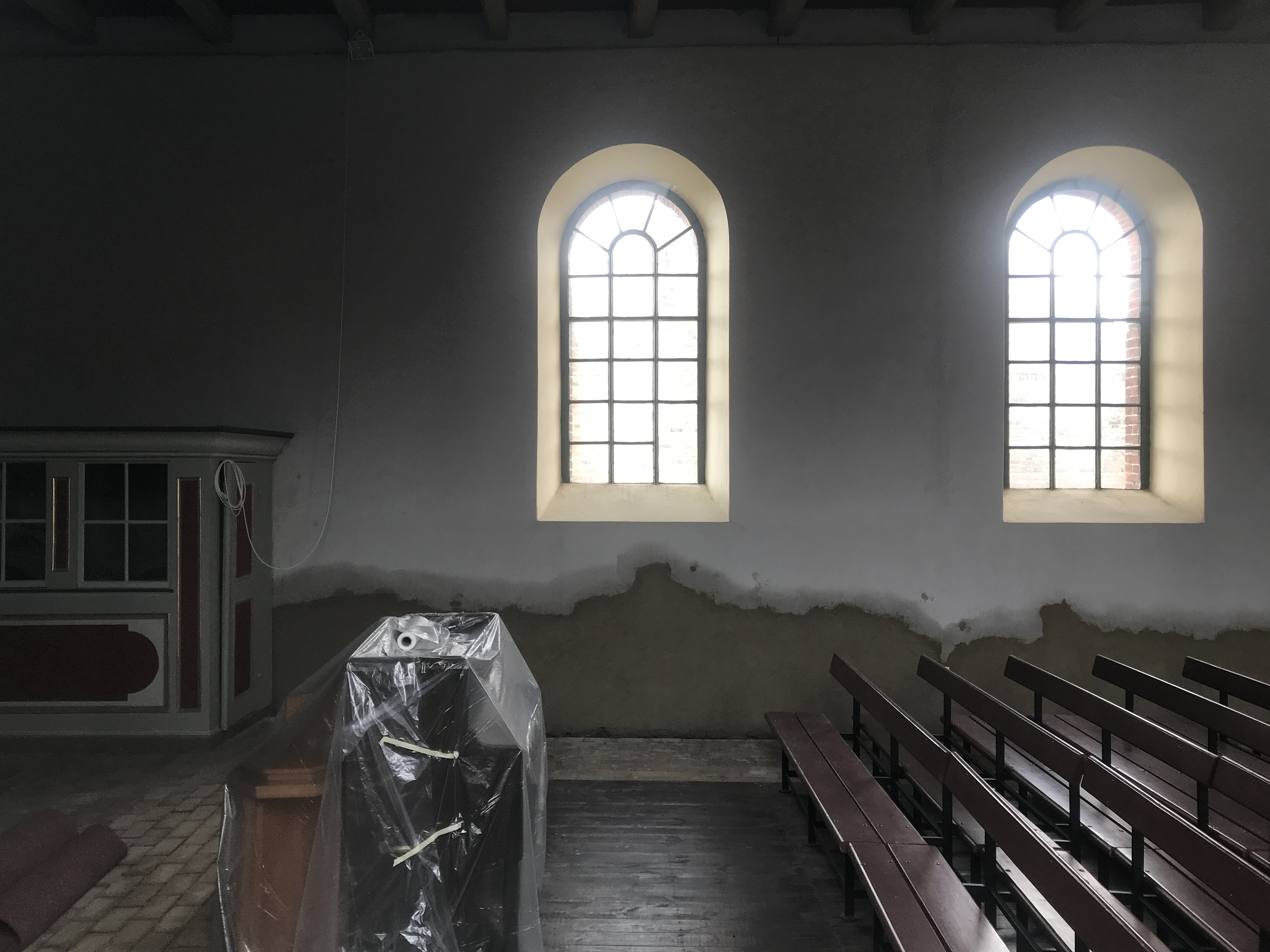 Spätromanische Feldsteinkirche in Körbitz, Gemeinde Niederer Fläming in Brandenburg